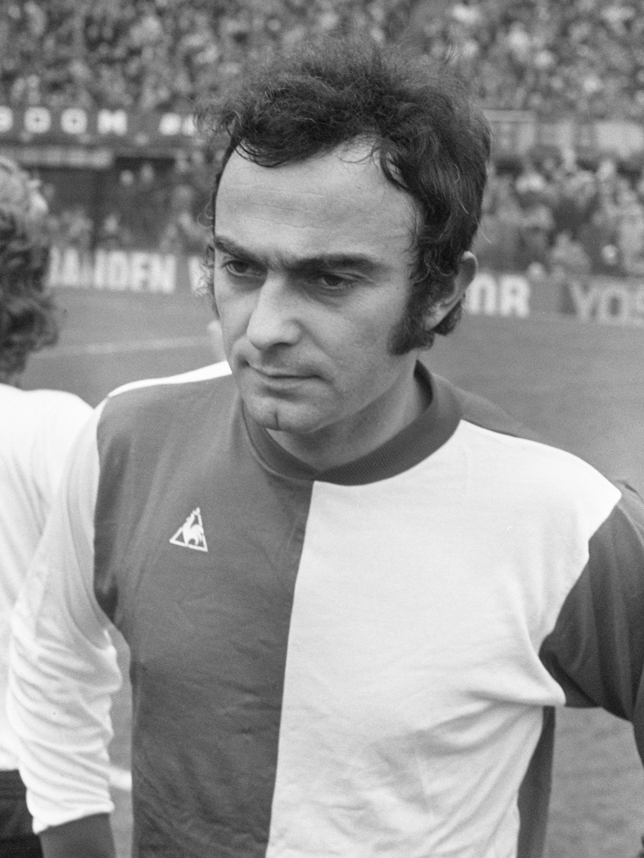 Feyenoord tegen NAC: 3-0; Mladen Ramljak 23 december 1973